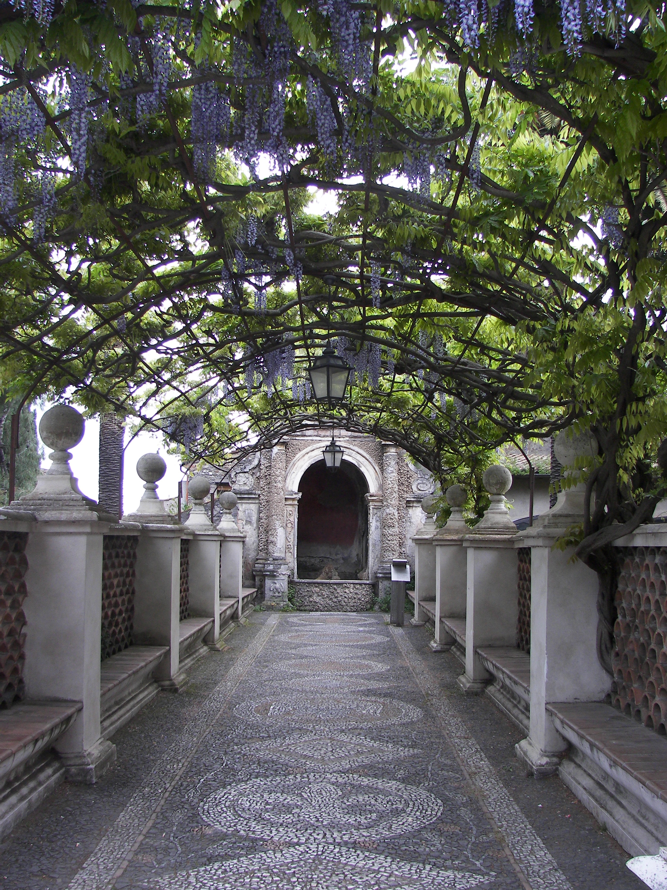 Pergola alla fontana dell'organo di Villa d'Este in Tivoli.